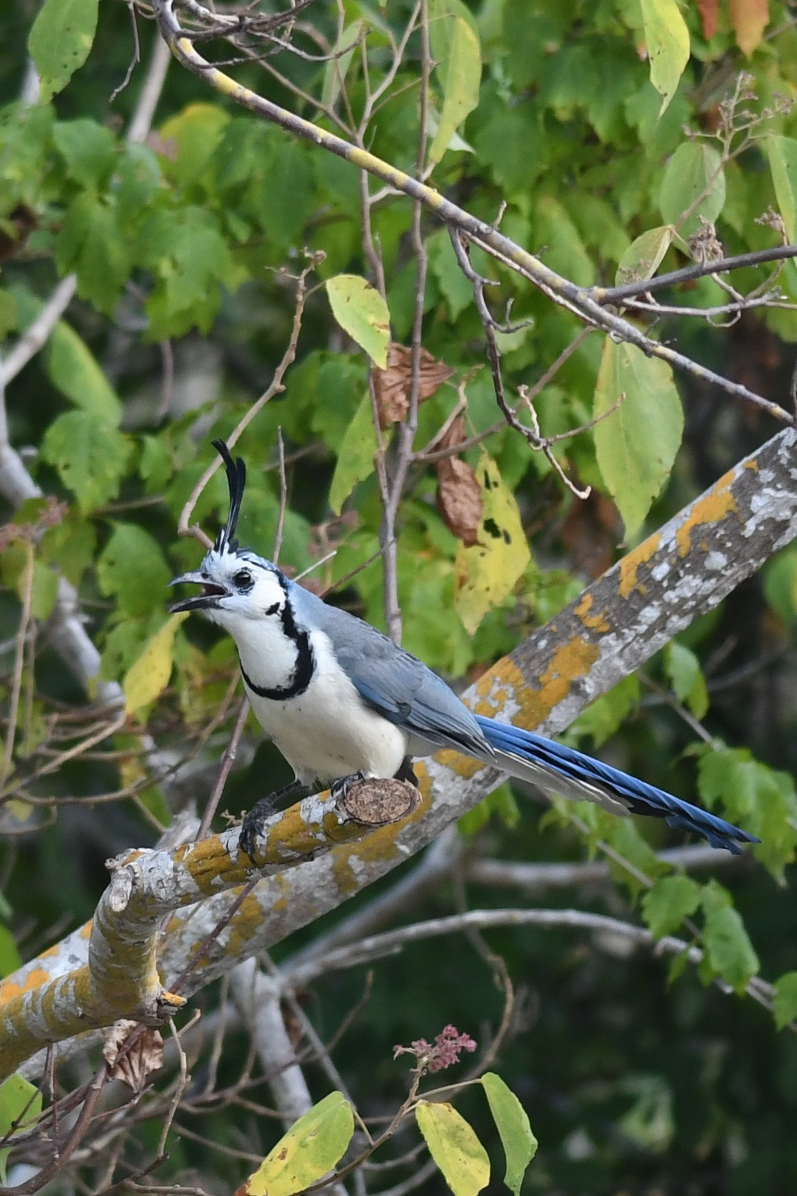 Huatulco, Oaxaca, México